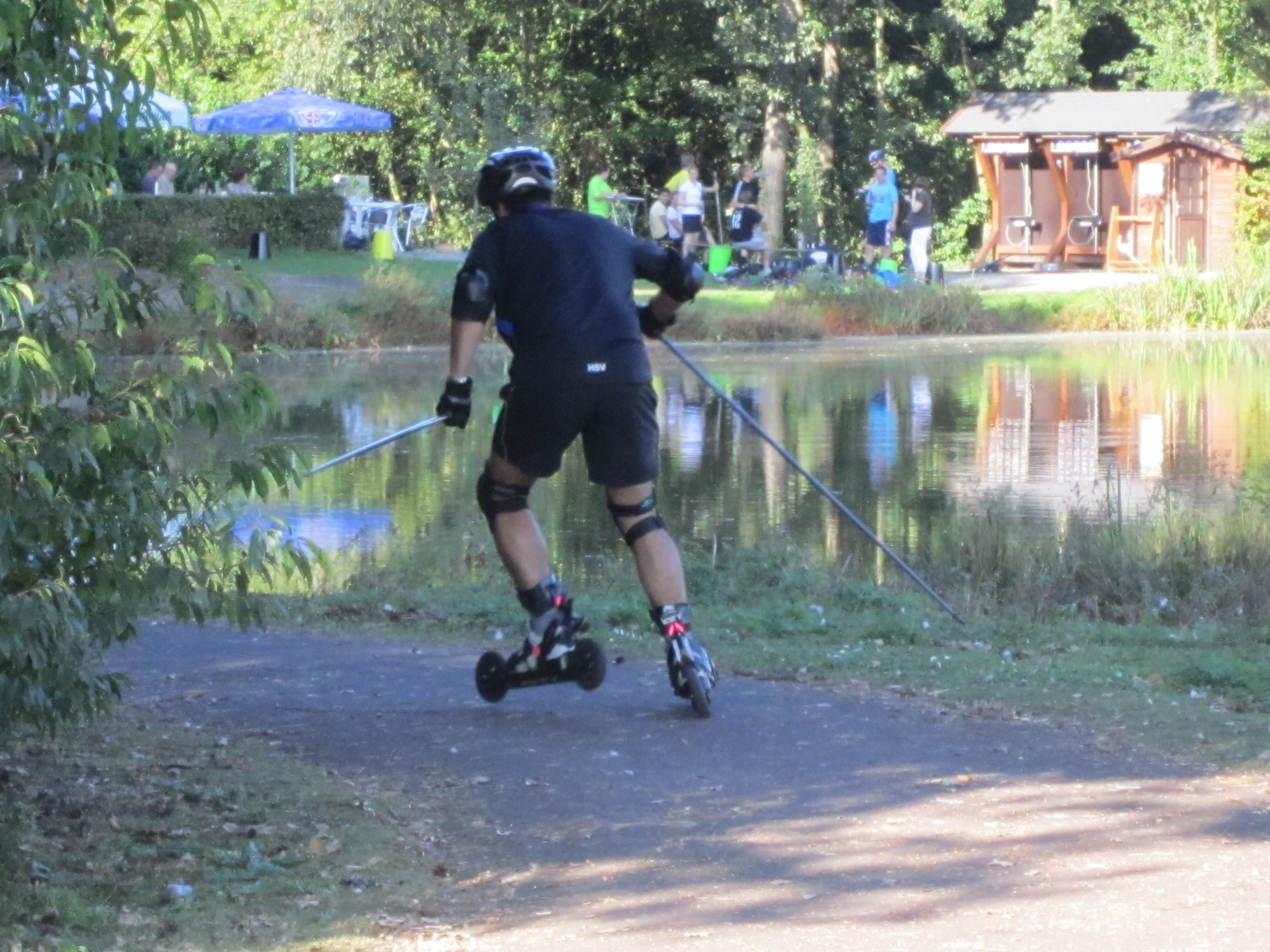 Nordteil des Saller Sees im Emsland